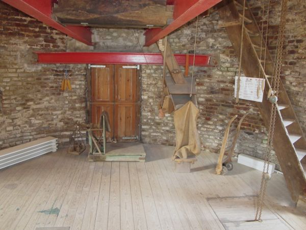 Blick in die Mühle, Mehlboden